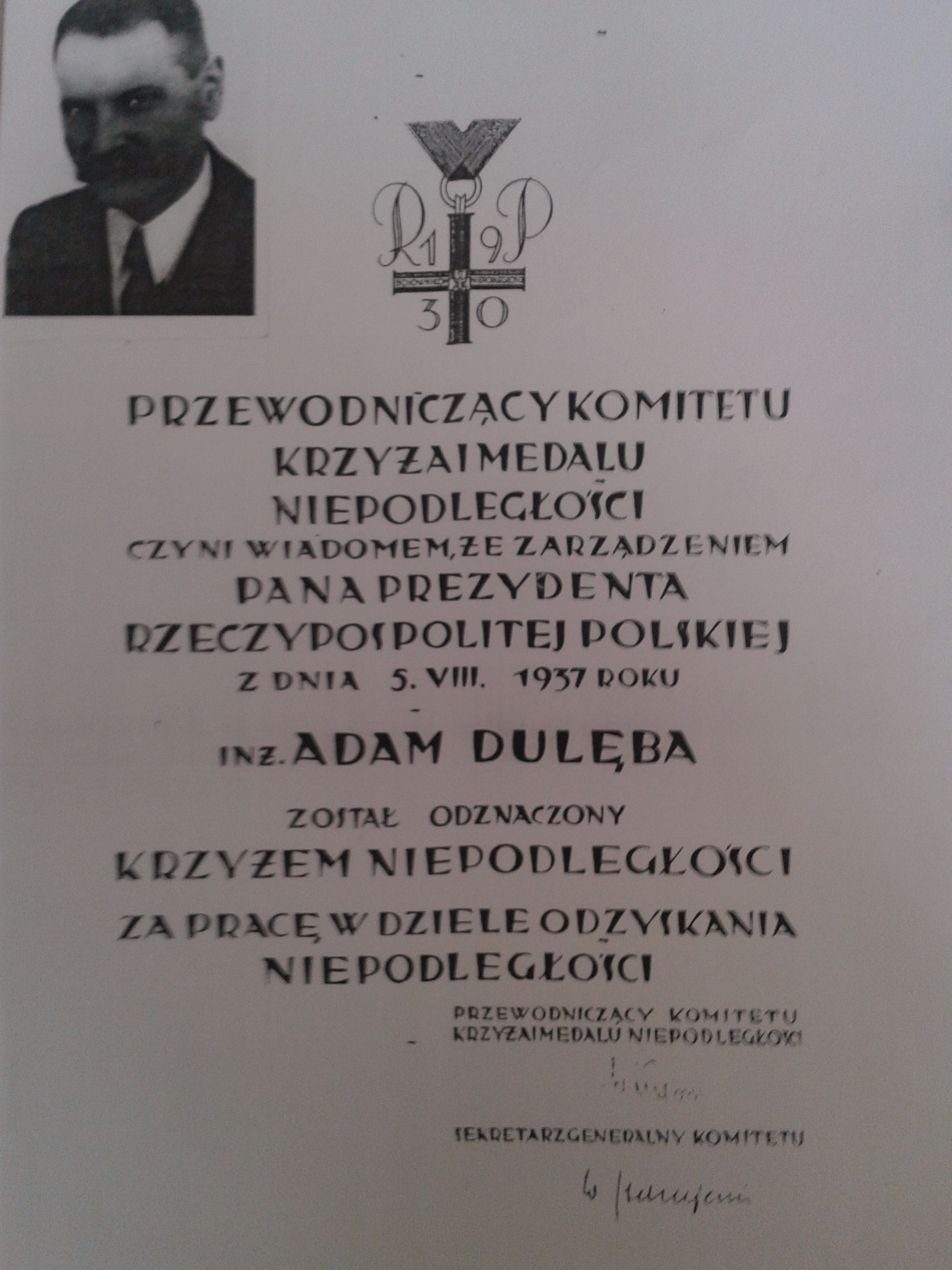 Dokument świadczący o odznaczeniu Adama Dulęby Krzyżem Niepodległości.